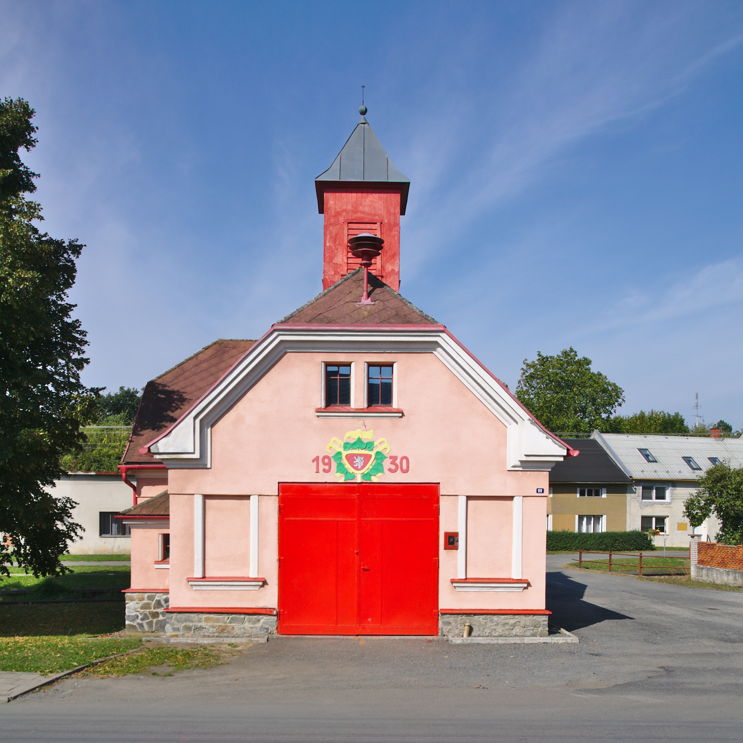 Hasičská zbrojnice, Výkleky, okres Přerov